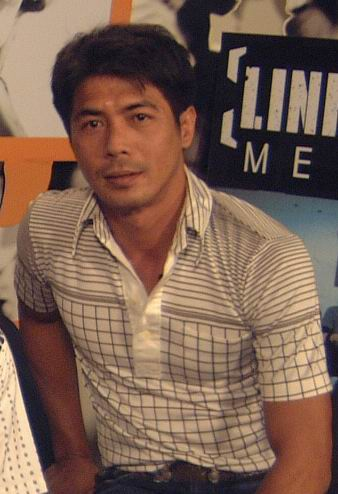 Samart Payakaroon at MTV